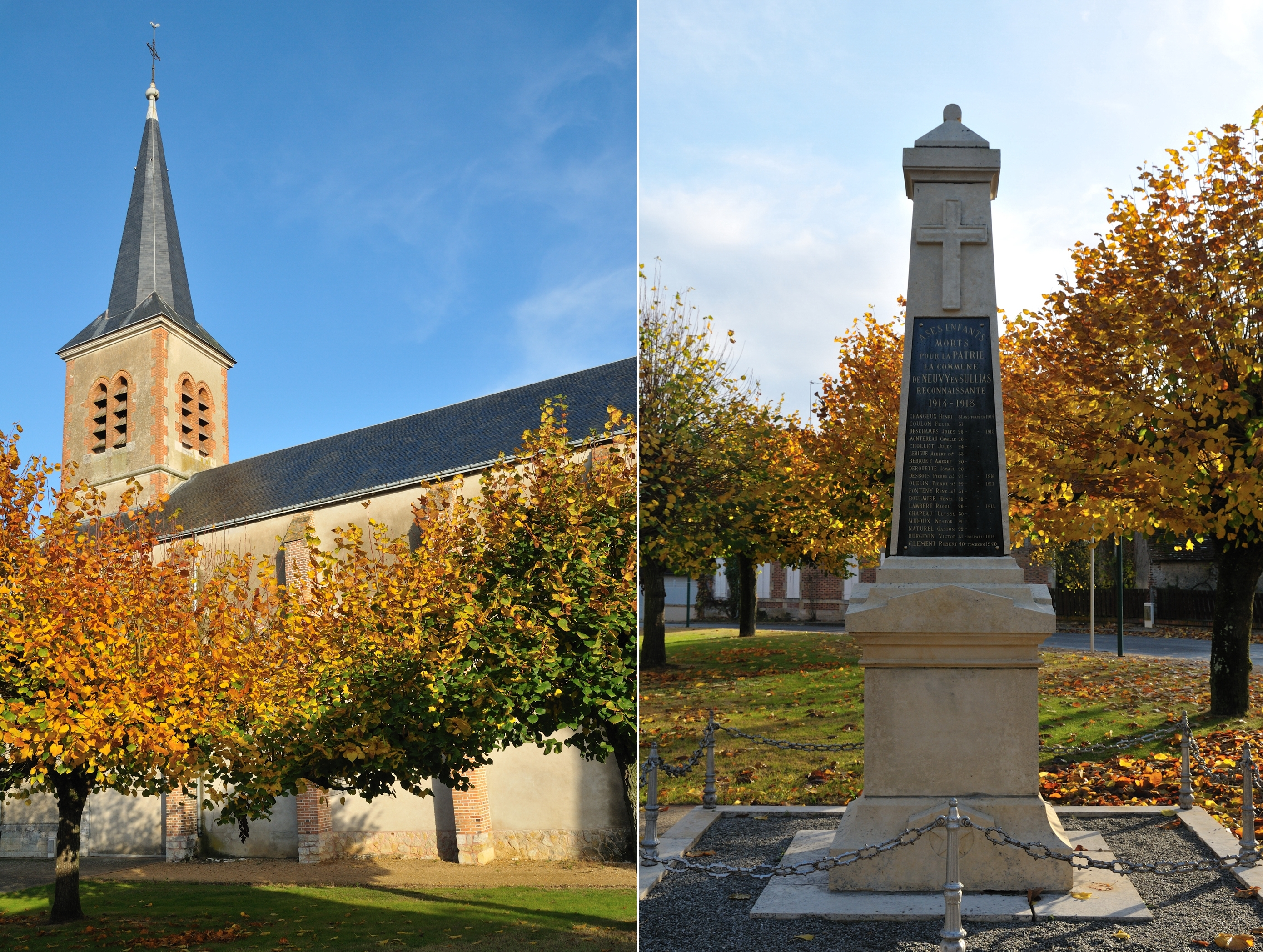 Assemblage de deux photos (église Saint-Jean-Baptiste et monument aux morts) de Neuvy-en-Sullias, Loiret, France